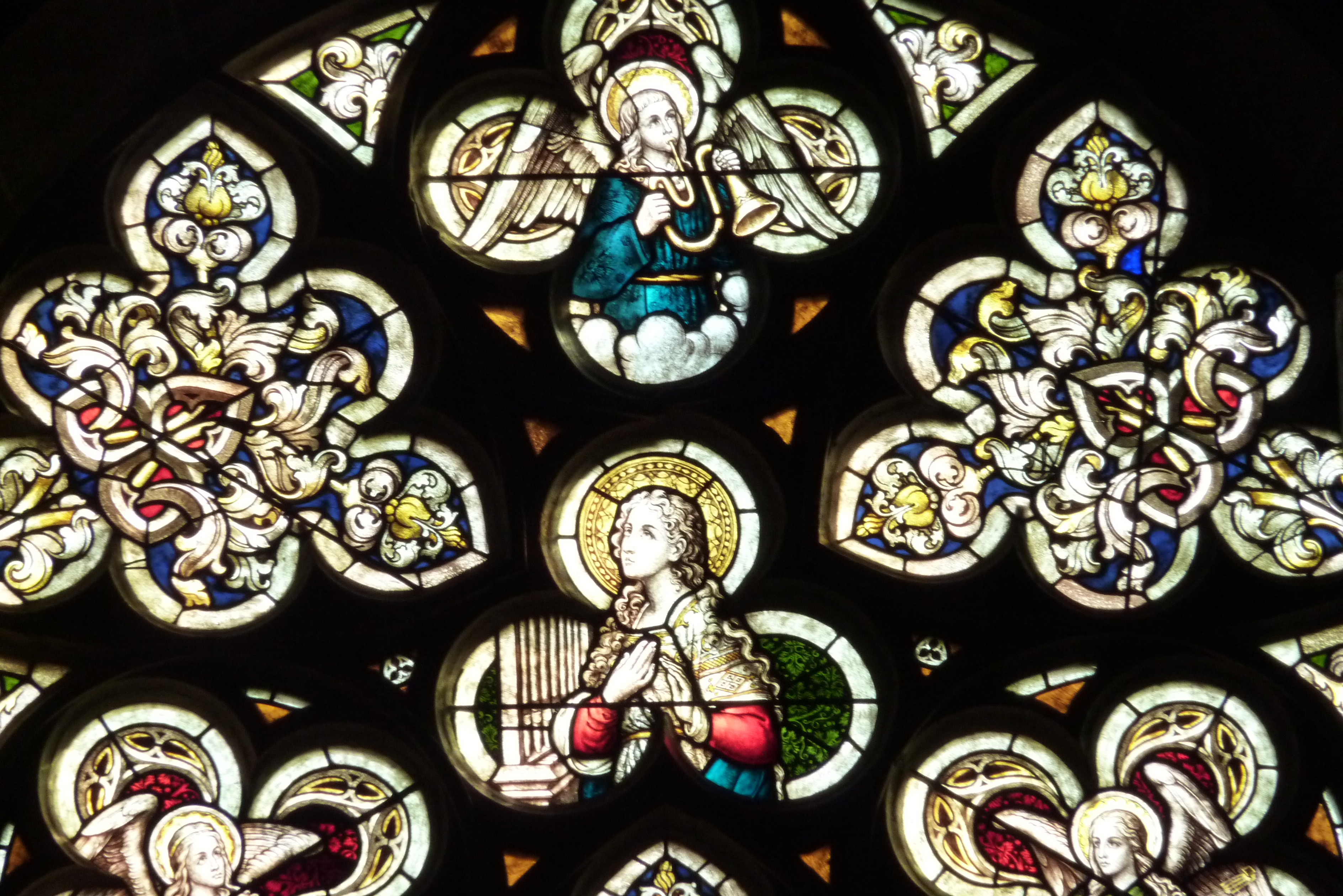 Bleiglasfenster (Schiff) in der katholischen Pfarrkirche St. Lambertus in Kirchdaun, Darstellung: hl. Cäcilia